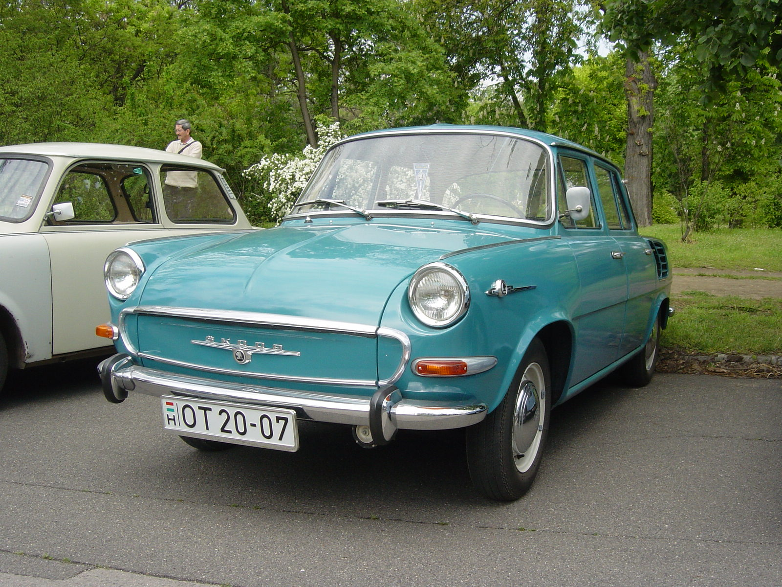 Blue Škoda 1000 MB at the Szocialista Jáműipar Gyöngyszemei 2008.